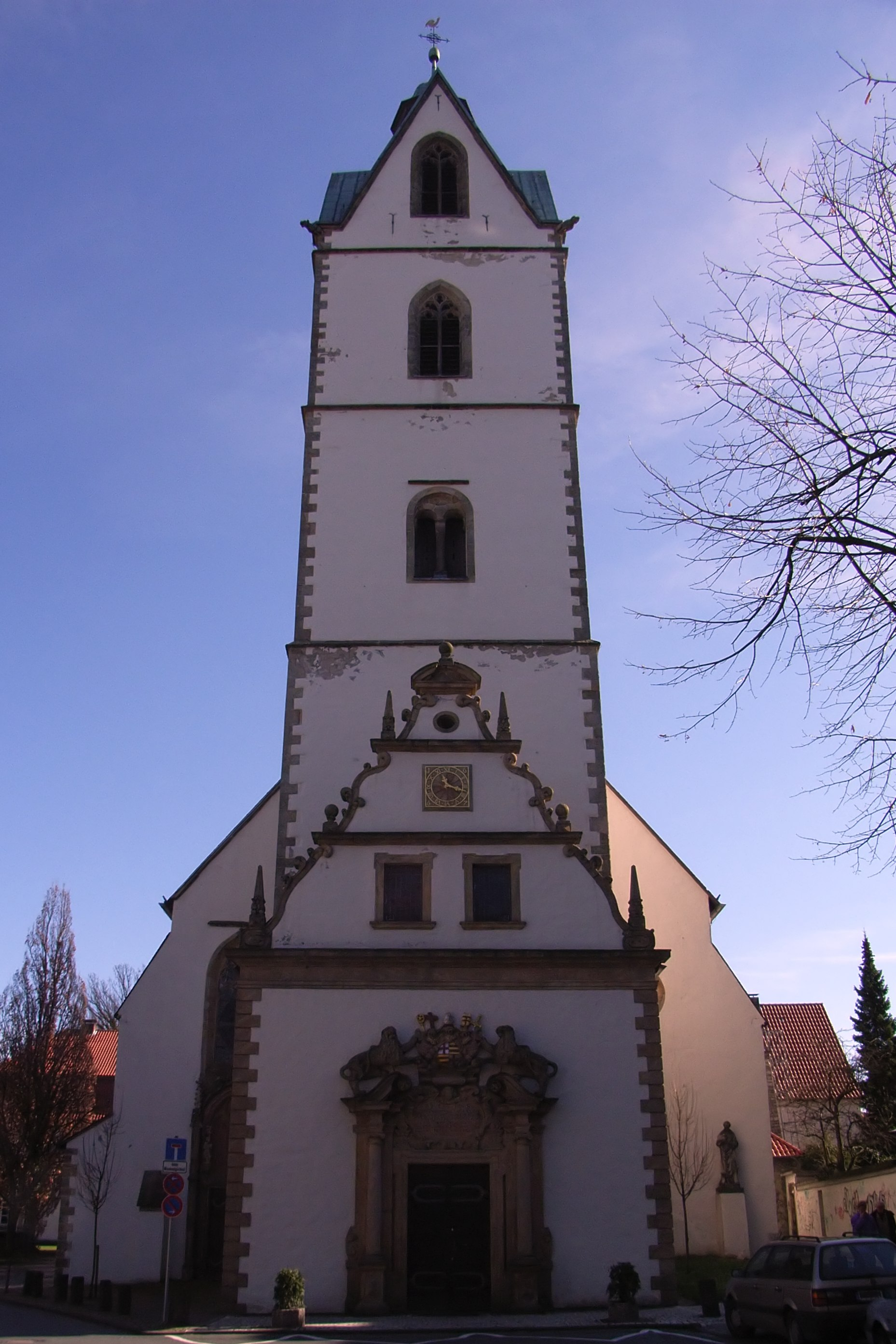 Paderborn, Deutschland: Busdorfkirche.